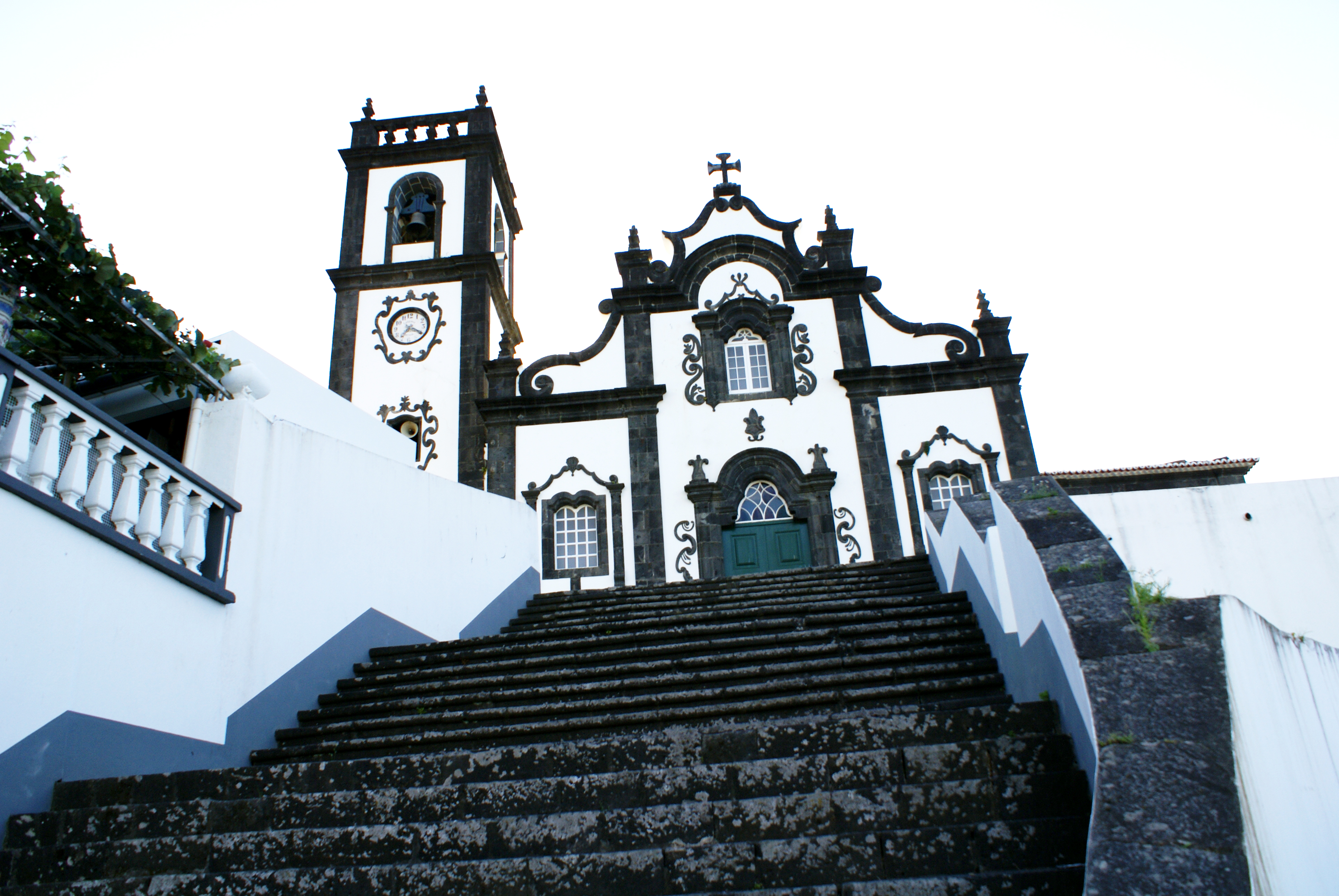 Igreja Nossa Senhora da Graça, Porto Formoso, Ribeira Grande, ilha de São Miguel, Açores